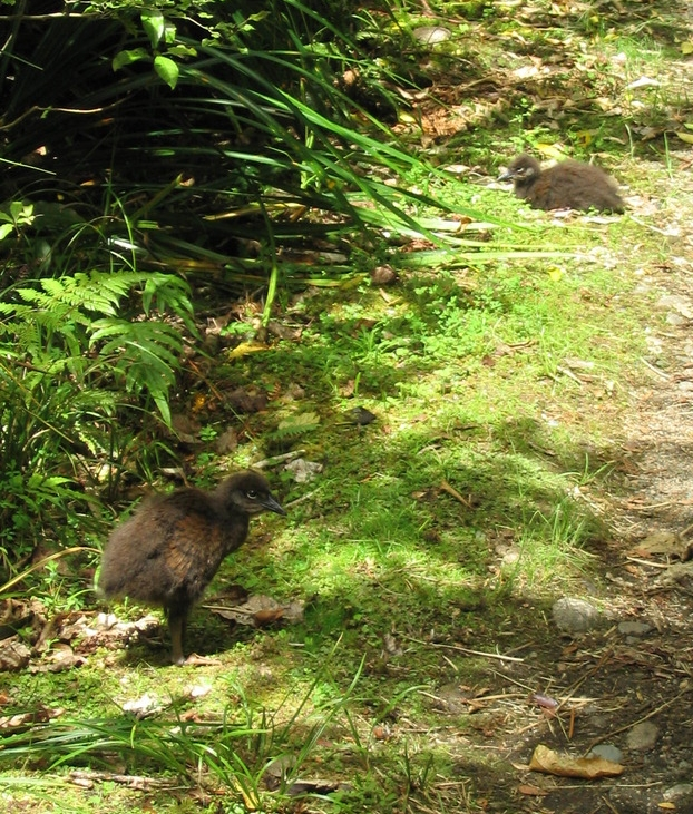 Weka chicks (Gallirallus australis)